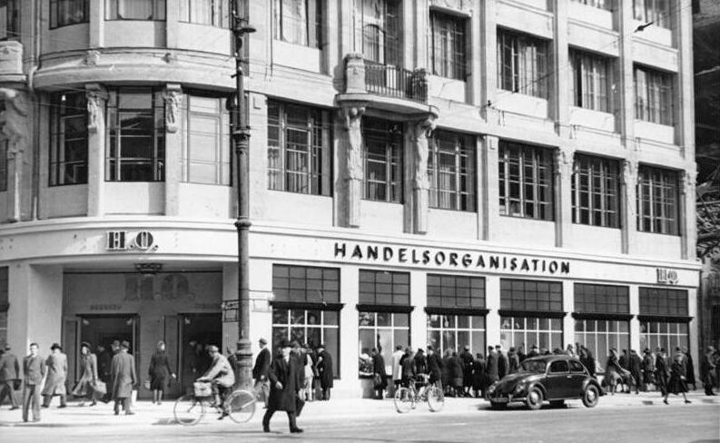 Berlin, neues HO-Kaufhaus ADN-ZB/ Illus-Rudolph Neuer HO-Laden eröffnet. In den Vormittagsstunden des 4.April 1949 wurde in der Leipziger, - Ecke Wilhelmstrasse ein Kaufhaus der Handelsorganisation, in dem Textilien und Lederwaren verrätig sind, eröffnet. UBz: Die Fassade des neuen HO-Kaufhauses. 4.4.1949 3025-49